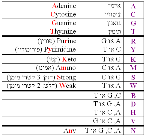 ציון נוקלאוטידים באמצעות אות אחת. נכתב והופק על-ידי Pixie